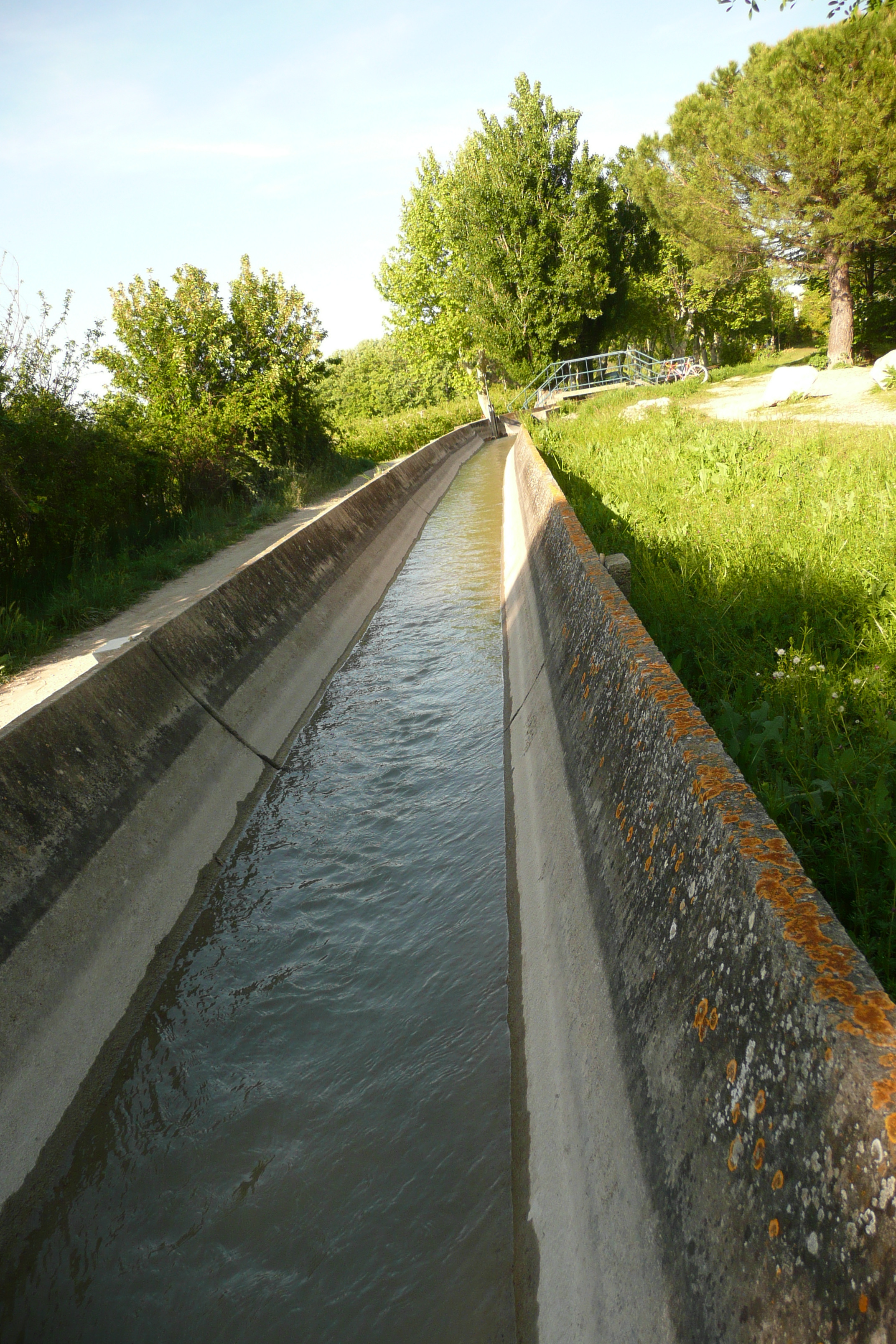 Canal d'eau à Charleval (Bouches-du-Rhône).